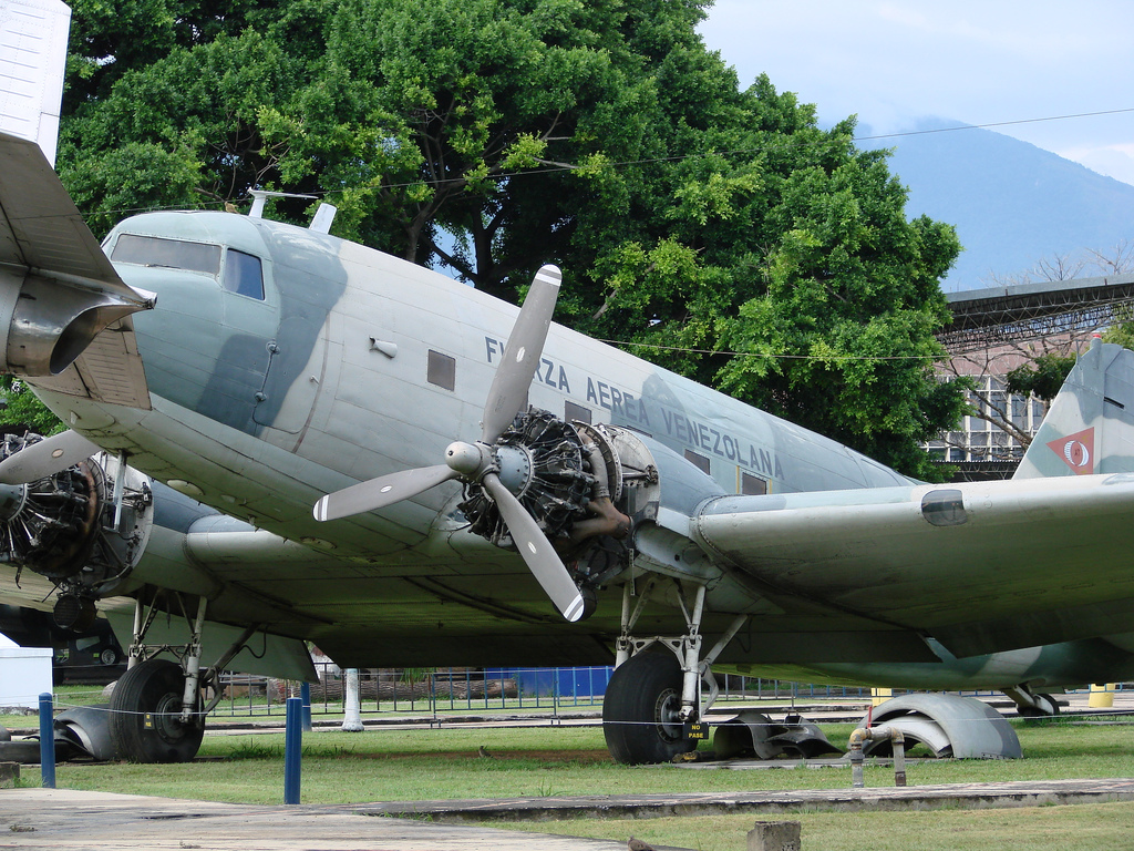 Maracay. Estado Aragua. Venezuela.